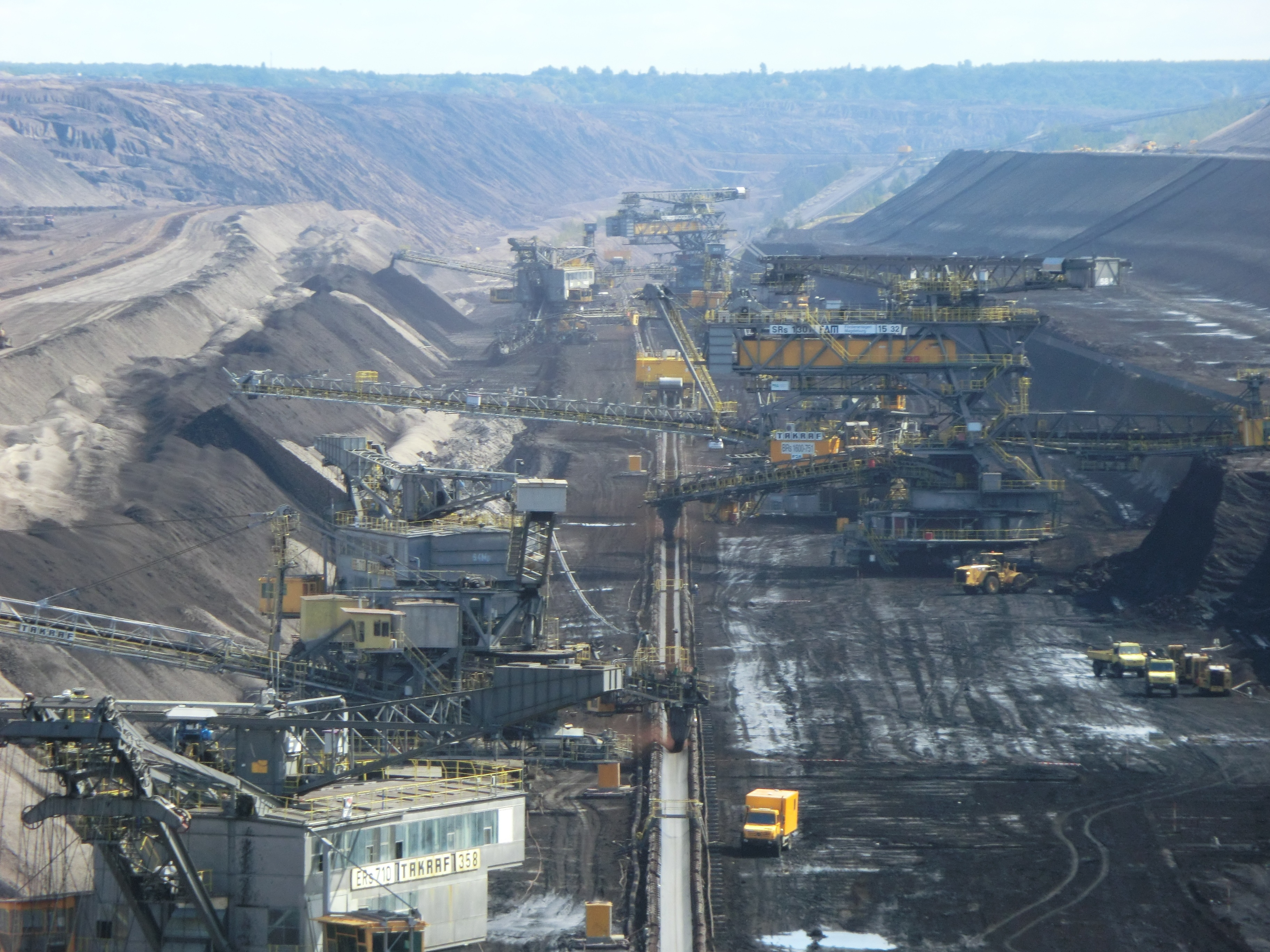 Blick in das Kohleflöz des Braunkohle Tagebau Welzow Süd